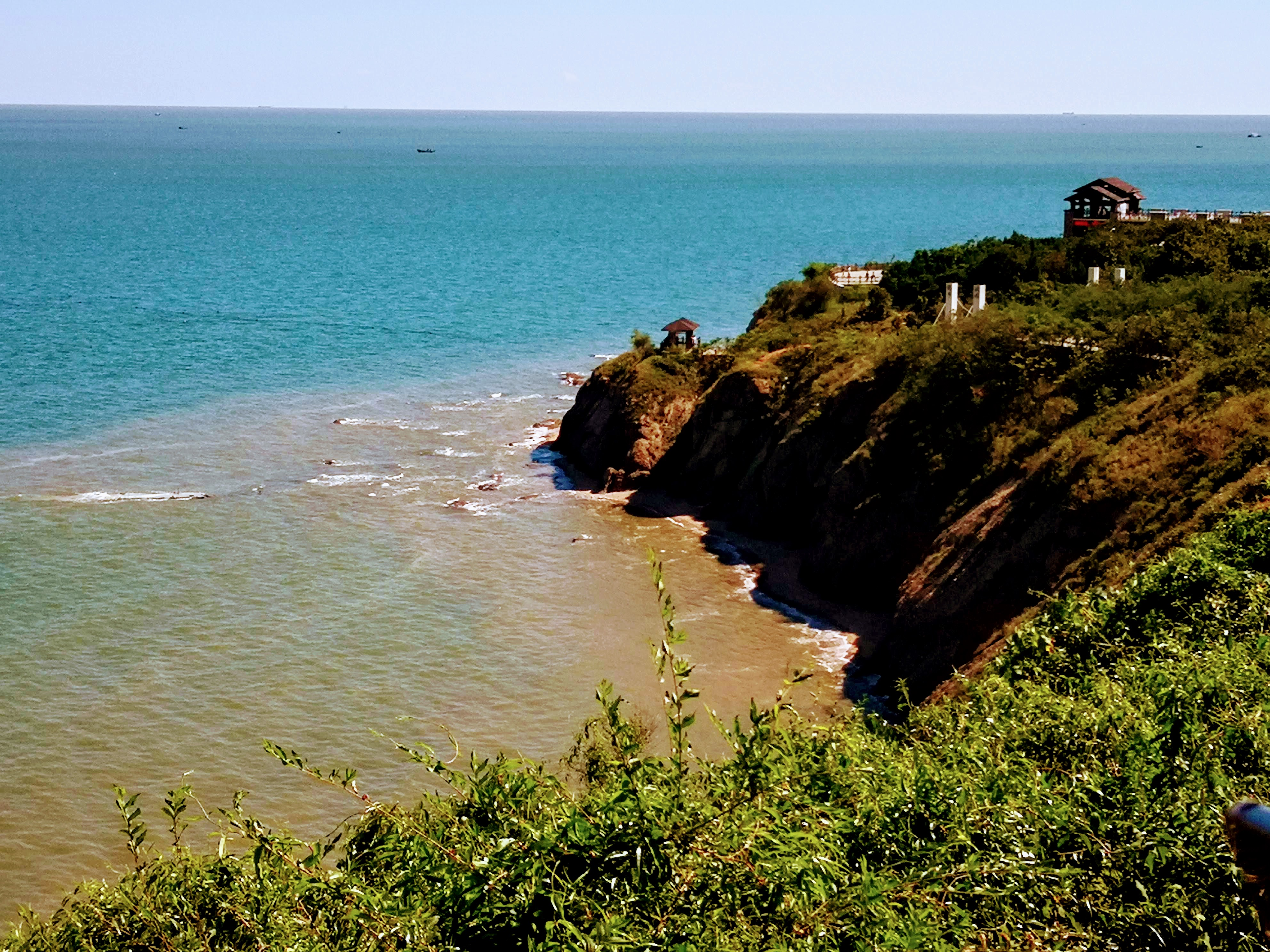 中文（中国大陆）: 葫芦岛海滨